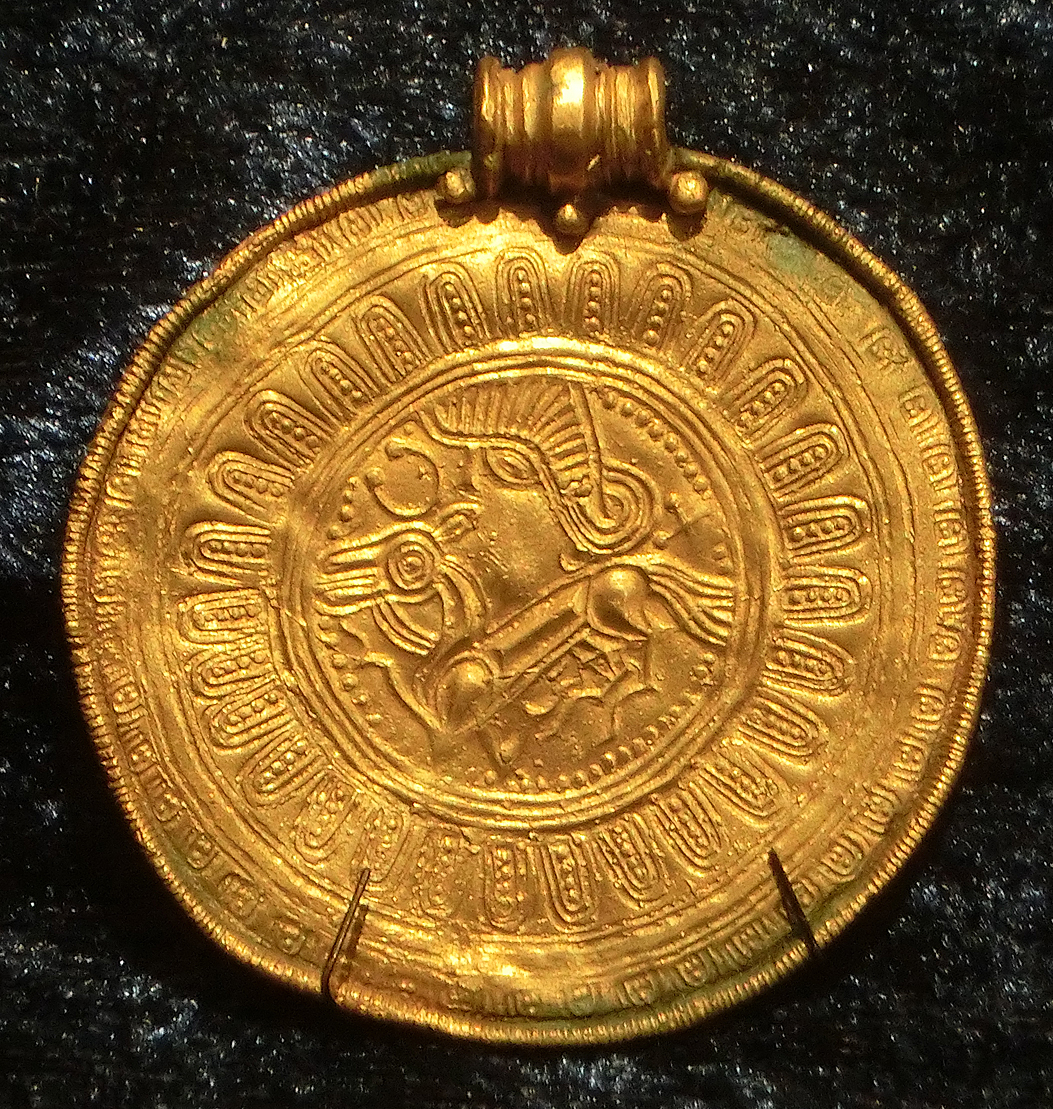 Kopia av guldbrakteat från Viglunda i Skånings-Åsaka socken, Skånings härad, Skara kommun, f.d. Skaraborgs län, Västergötland, Västra Götalands län, Sverige. Originalet hittades av bonden Lars Andersson i Viglunda vid grävning för grustäkt i en vanlig sandbacke. Originalet inlöstes 1849 av Historiska museet i Stockholm och har där inventarienummer SHM 1535a. Kopian införskaffades till Falbygdens museum i Falköping 1934 och har där inventarienummer 2M16-F1074. Fotot är taget i den tillfälliga utställningen Finnestorp - Mossen, makten och guldet, som visas sommaren 2013 på Falbygdens museum i Falköping, Västergötland, Sverige.